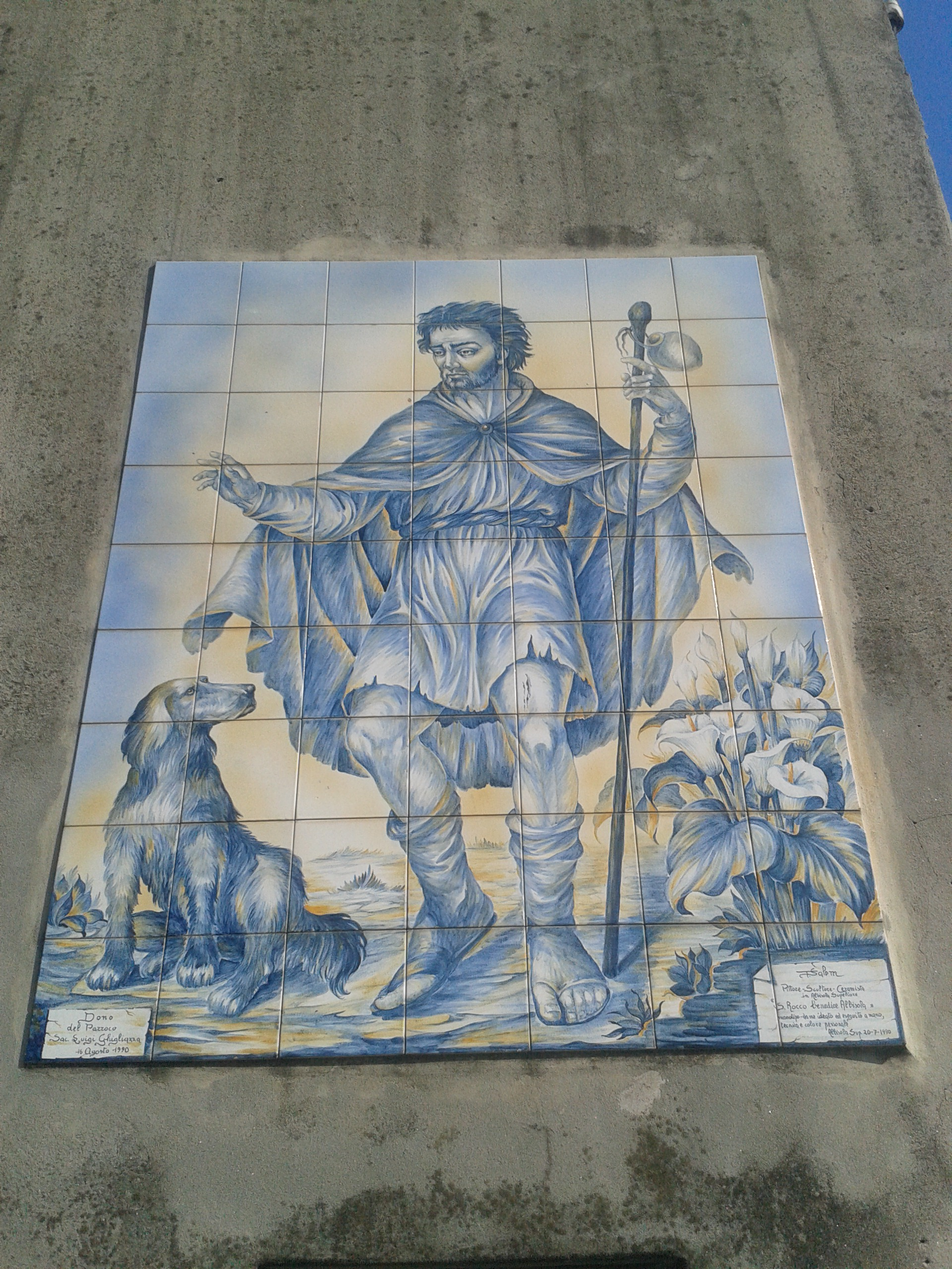 Pannello ceramico rappresentante San Rocco che benedice Albisola This is a photo of a monument which is part of cultural heritage of Italy.